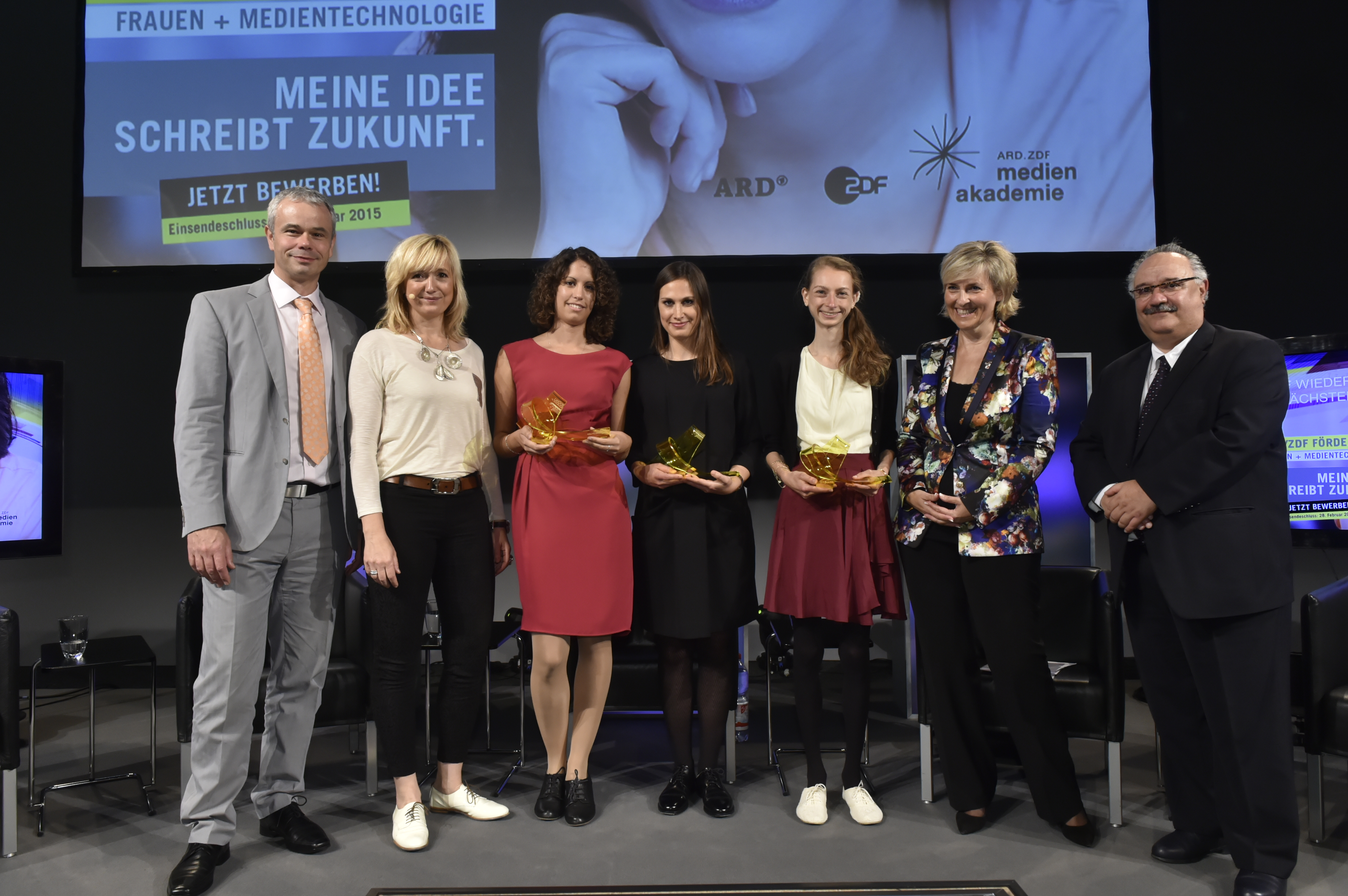 (v. l.n. r.) Harald Brendel (ARRI Cine Technik), Anja Koebel (Moderatorin), Silvia Santano (1. Preis), Verena Ecker (2. Preis Andrea Burget (3. Preis), Prof. Dr. Karola Wille (MDR), Nawid Goudarzi (rbb)